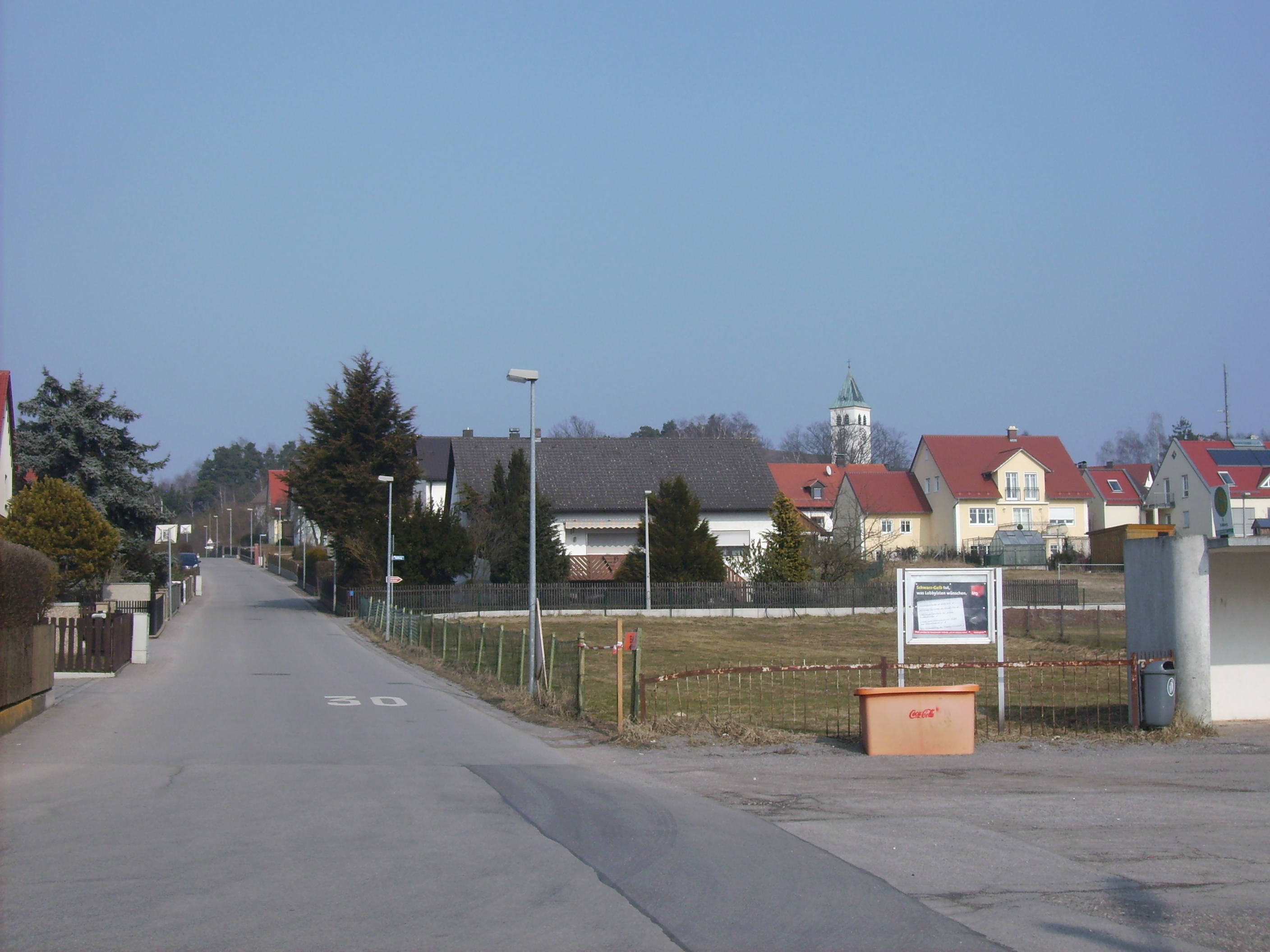 Keilberg im Nord-Osten Regensburgs